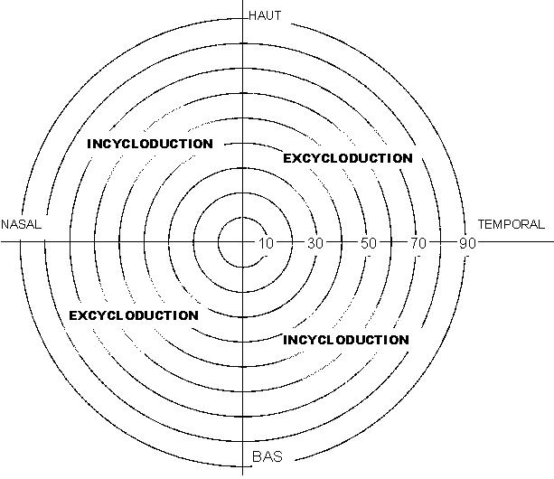 nature de la cycloduction en fonction de la direction d'observation